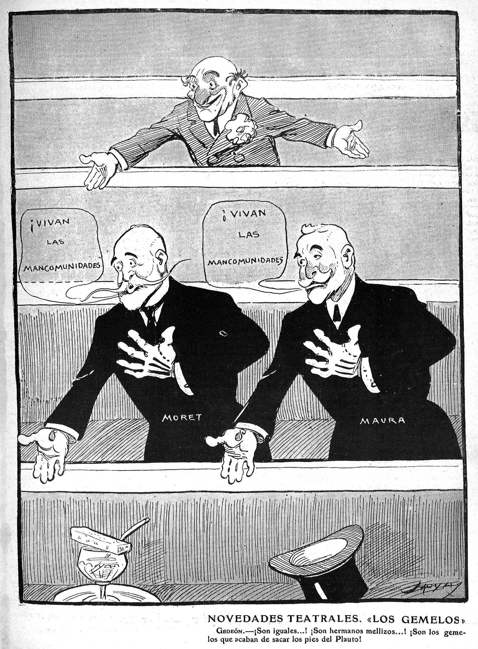 «Novedades teatrales: "Los gemelos"», en la revista satírica española Gedeón.